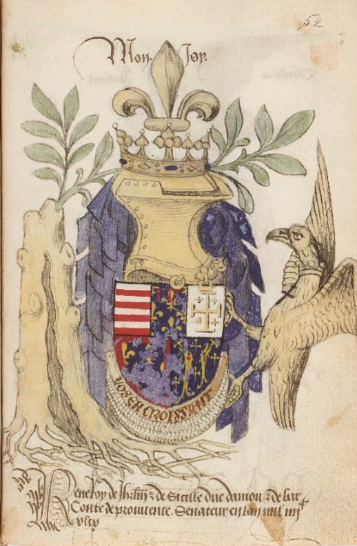 Armes du roi rené d'anjou avec la devise 'Los en croissant' in Statuts de l'ordre du croissant', BNF folio 52 Ms fr 25204.